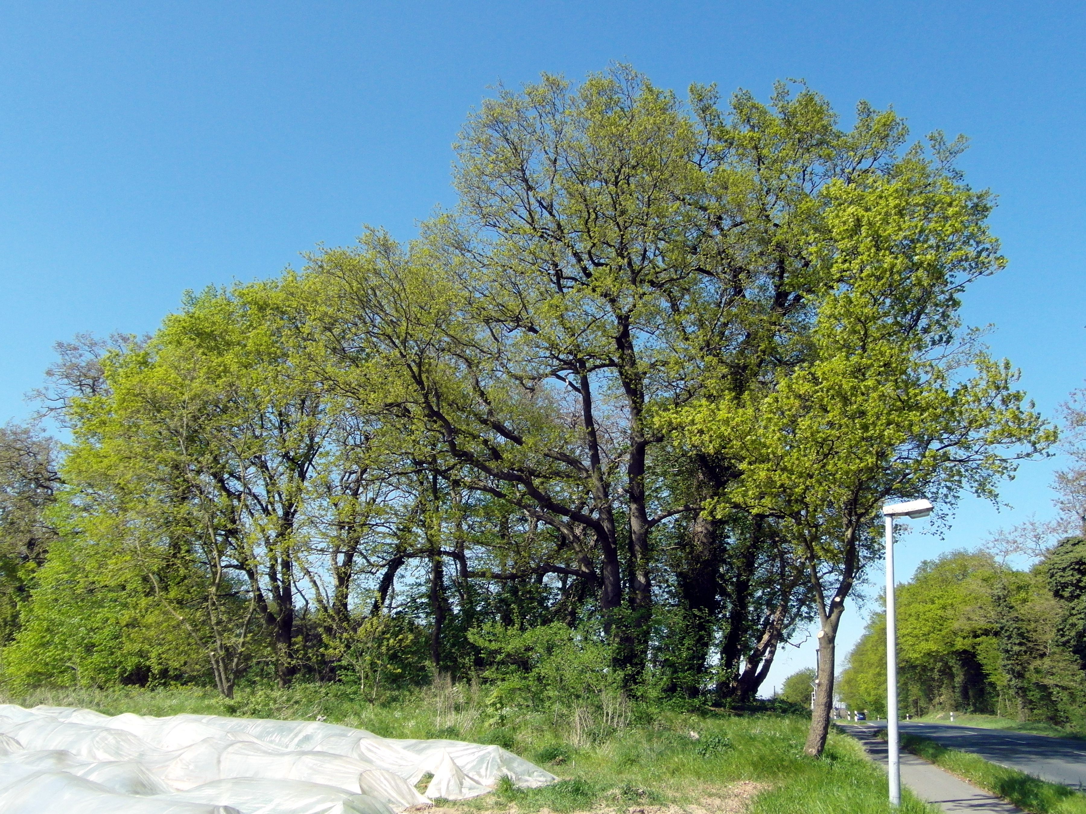 Der Galgenberg zwischen den Stadtteilen Blumenau und Liethe ist ein Naturdenkmal (bronzezeitliches Hügelgrab) in der Stadt Wunstorf in der Region Hannover in Niedersachsen.